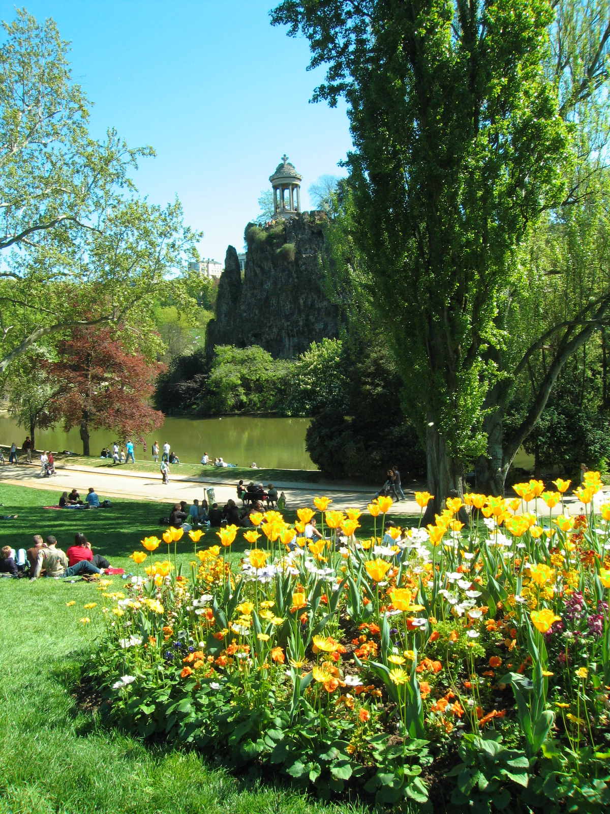 Parc des Buttes Chaumont, Paris